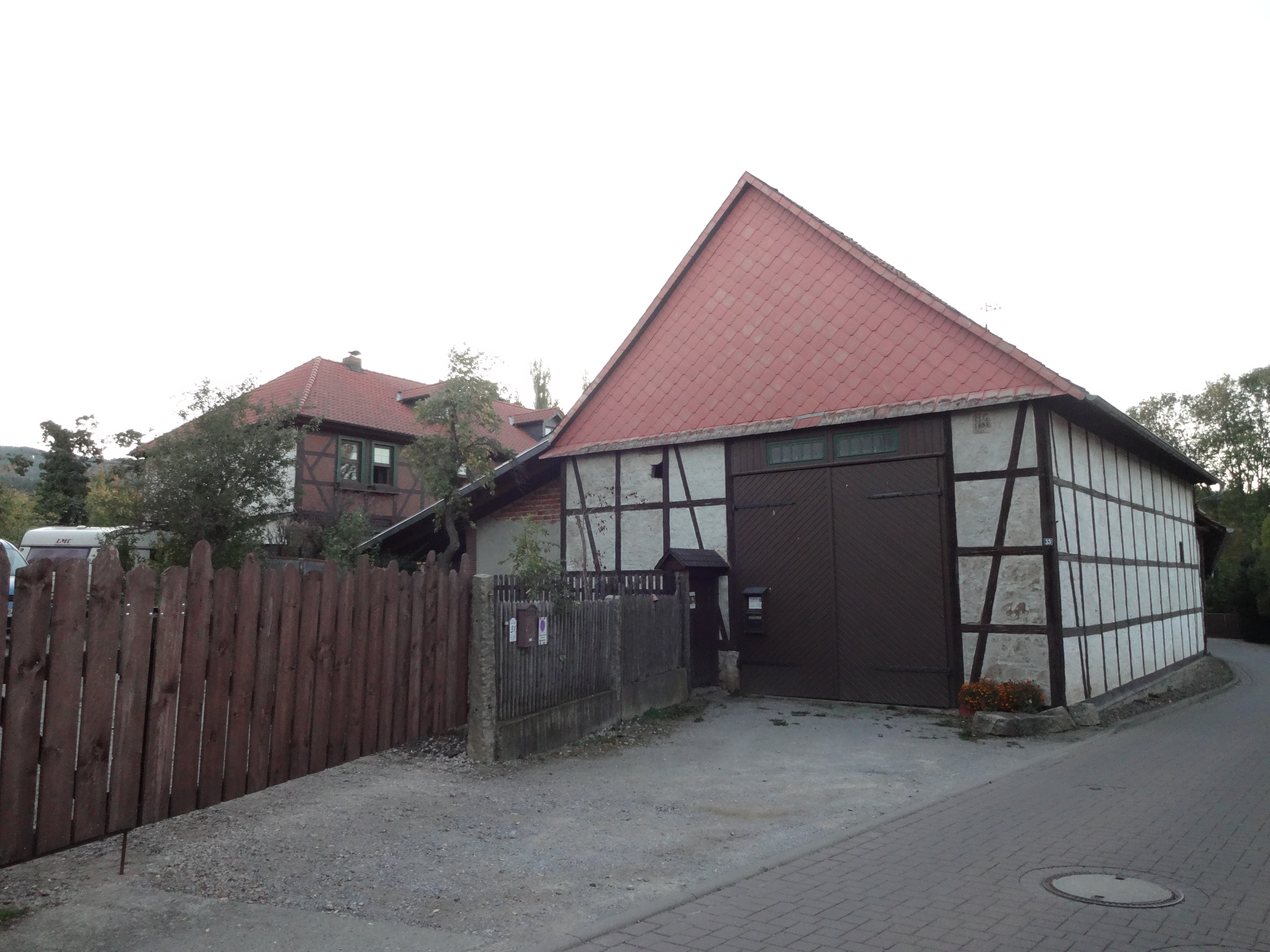 denkmalgeschützter Bauernhof in der Straße der Republik 33 in Darlingerode; sogenannter Edelhof